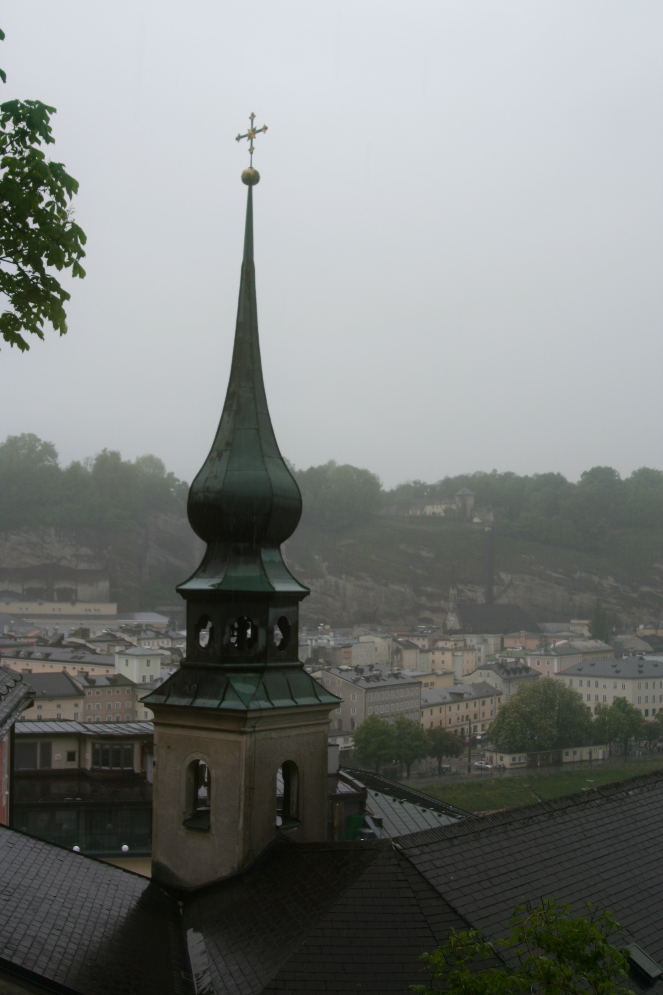 Imbergkirche